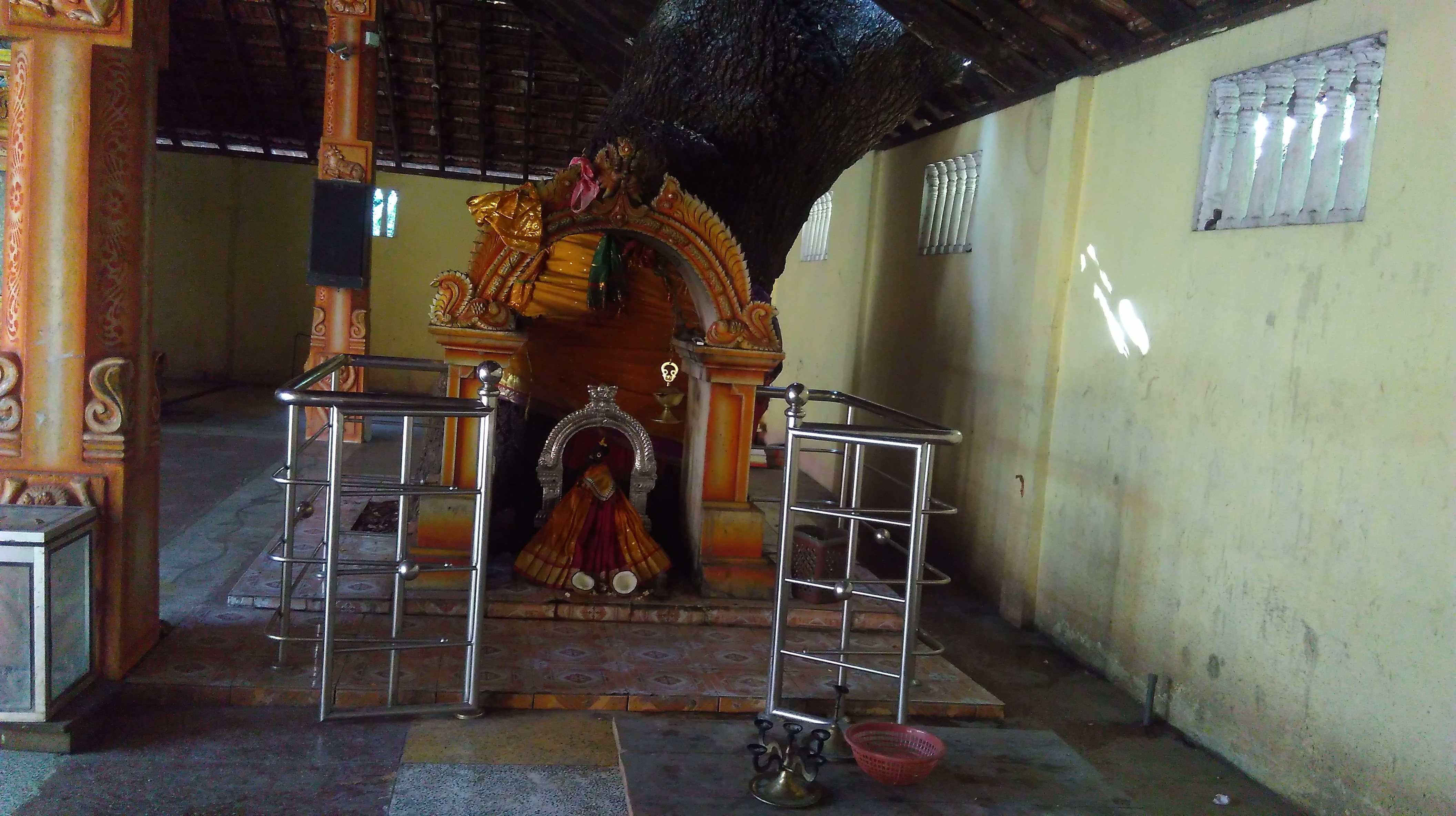 தலவிருட்சத்தில் (பாலை) அம்மன் விக்கிரகம்